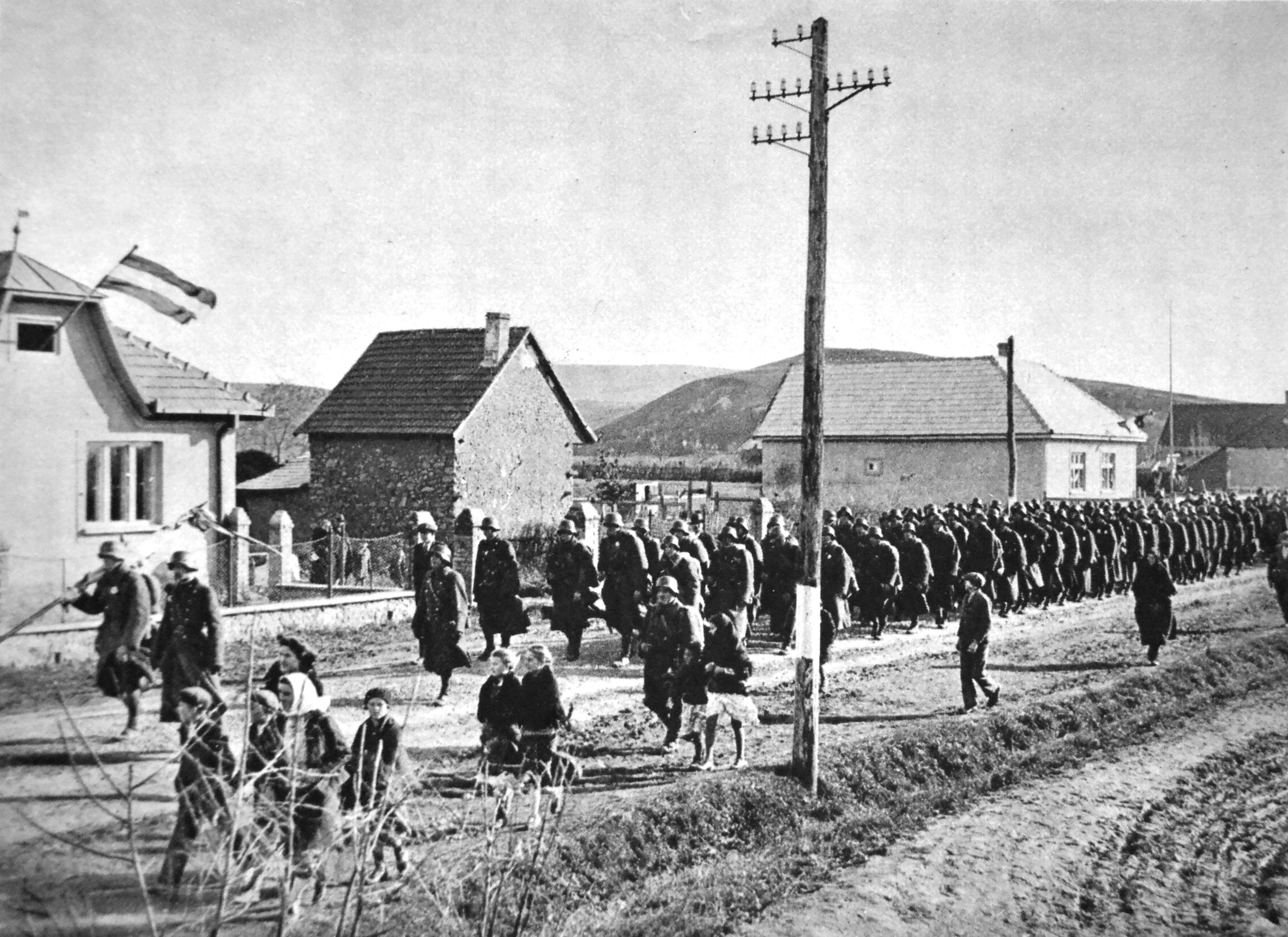 Po prvej viedenskej arbitráži, ktorá sa konala 2. novembra 1938, 8. novembra pripadla Streda nad Bodrogom Maďarsku